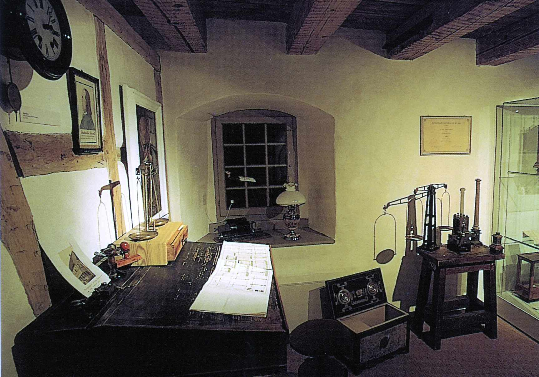 Philipp-Matthäus-Hahn-Museum im Kasten, Albstadt Onstmettingen